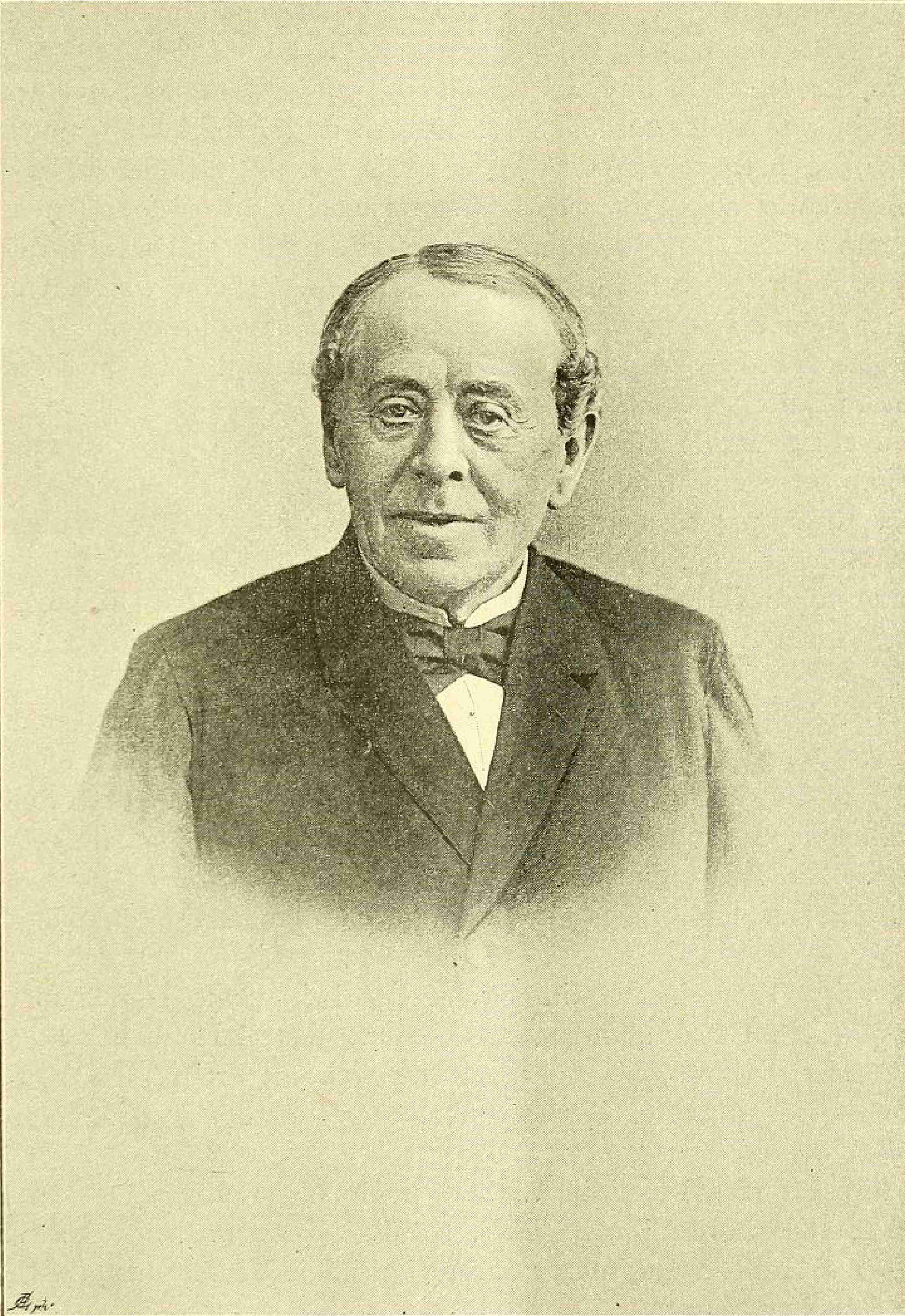 Porträt Ferdinand Jühlke (um 1890)